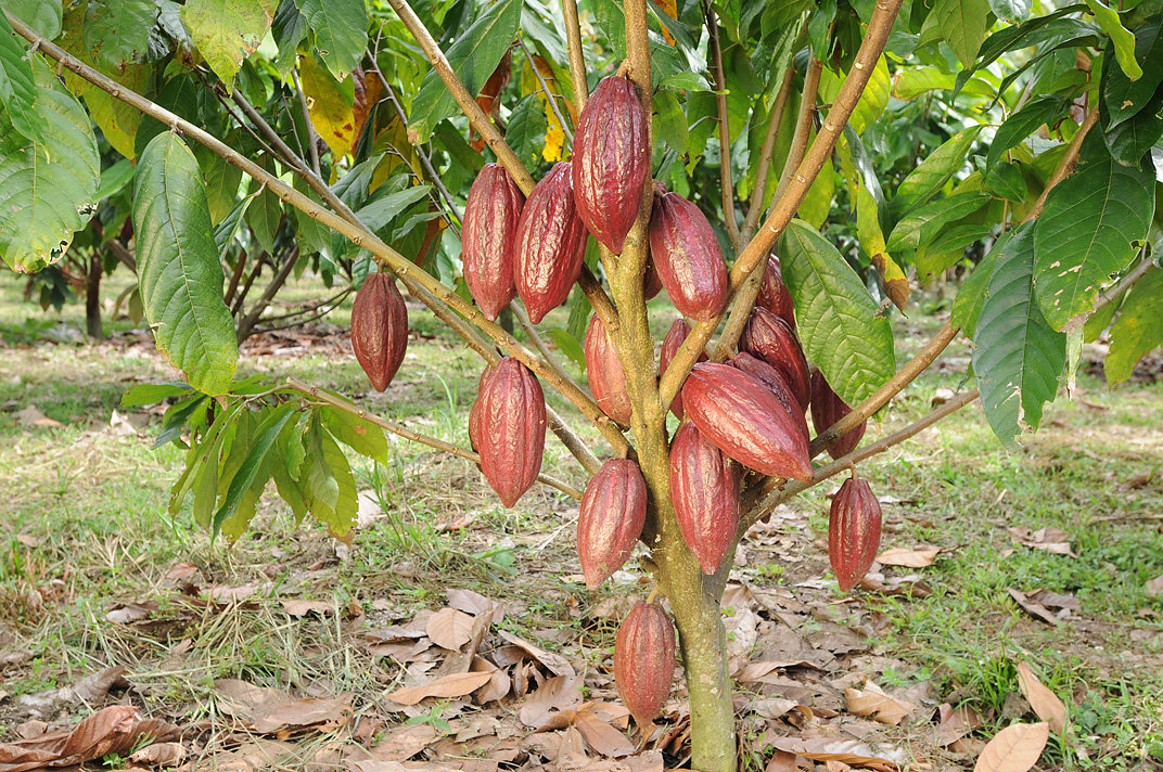 Cacao plant